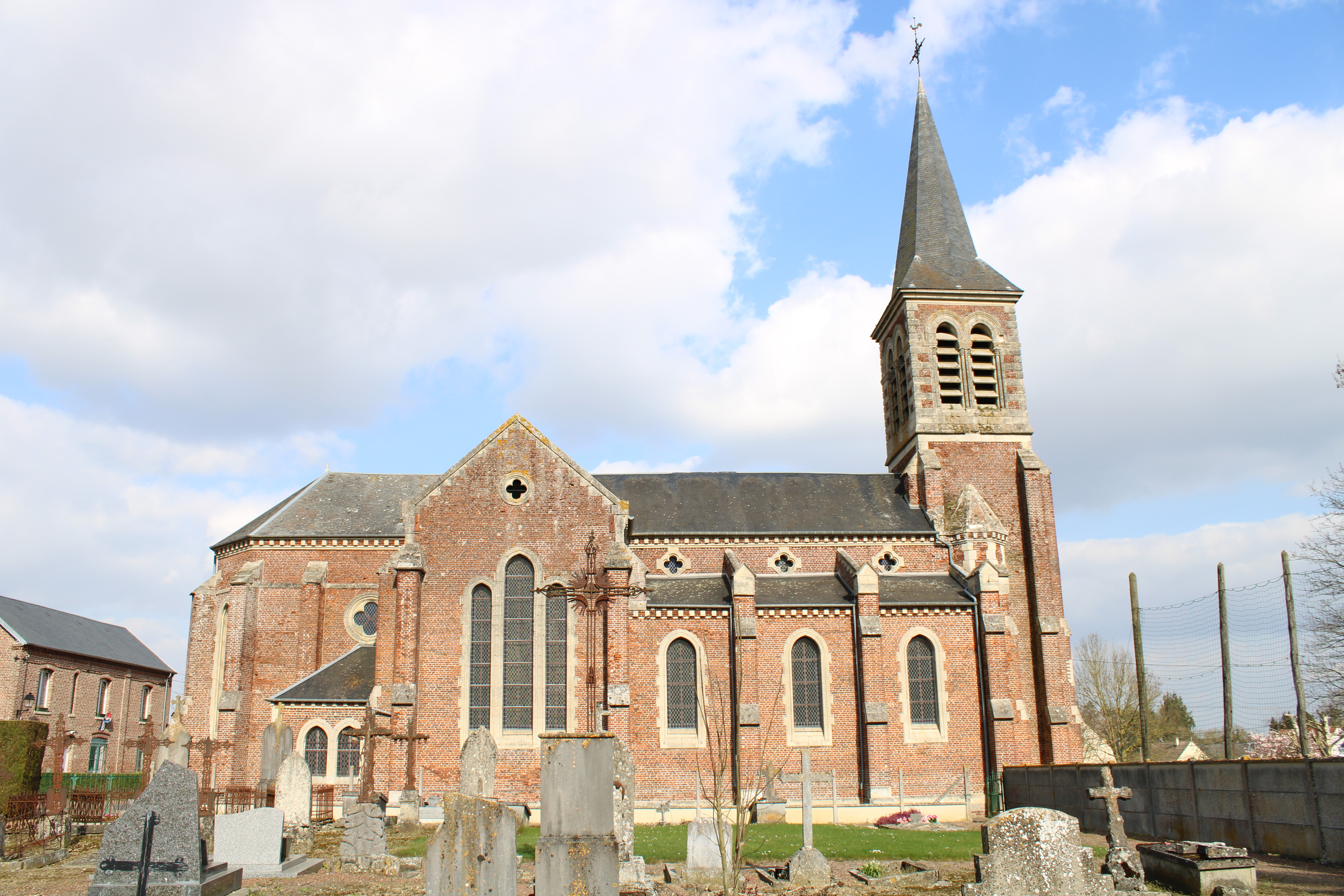 L'église.